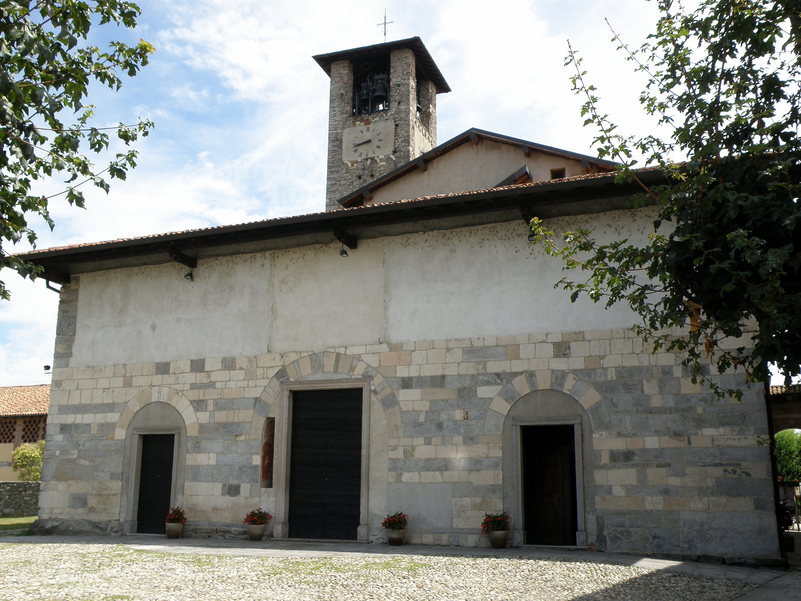 Sesto Calende (VA). Chiesa di San Donato, detta l'Abbazia, risalente al sec. IX. Facciata occidentale e torre campanaria.